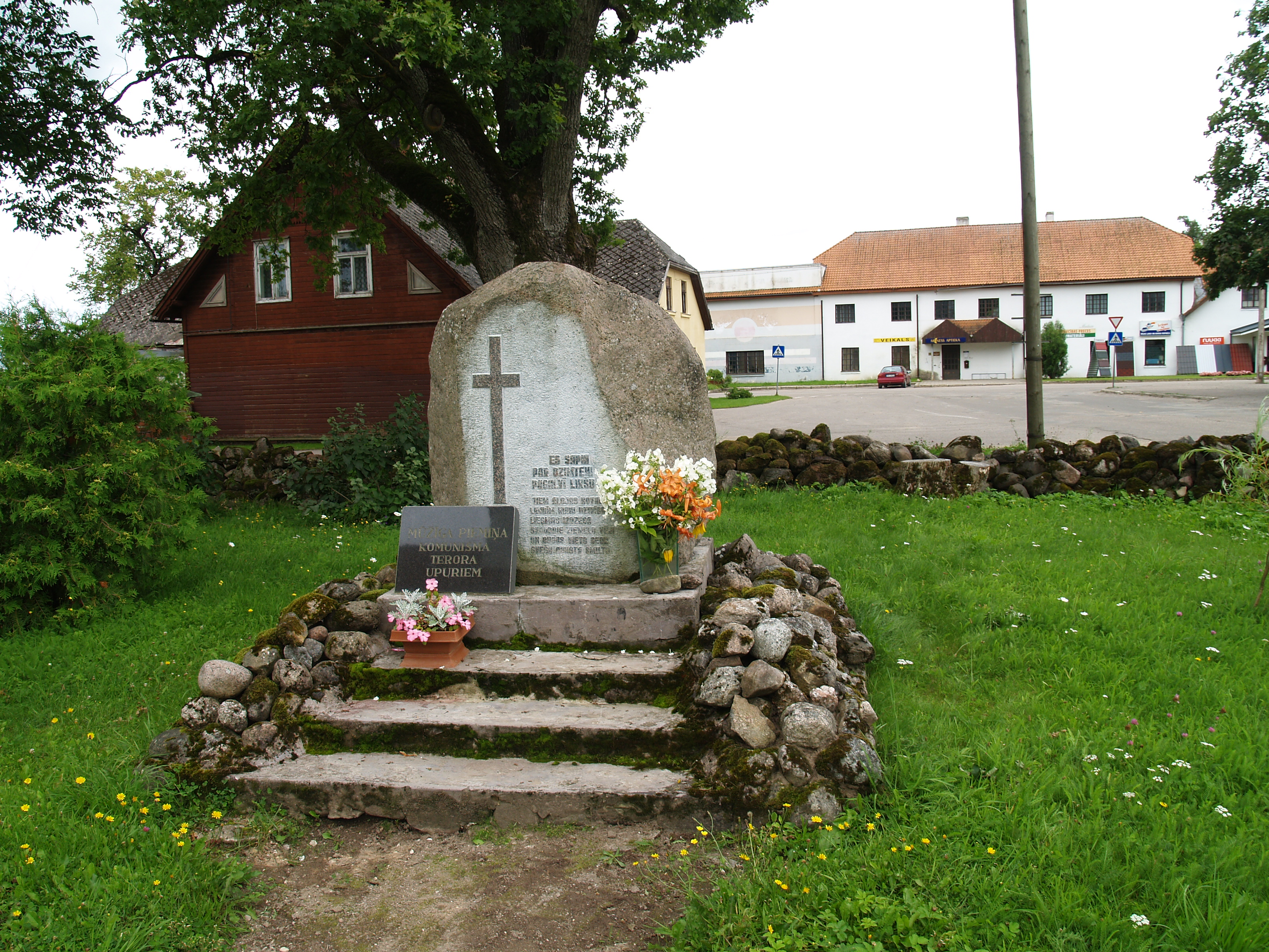 Aloja kommunismiohvite mälestuskivi kirikuaias